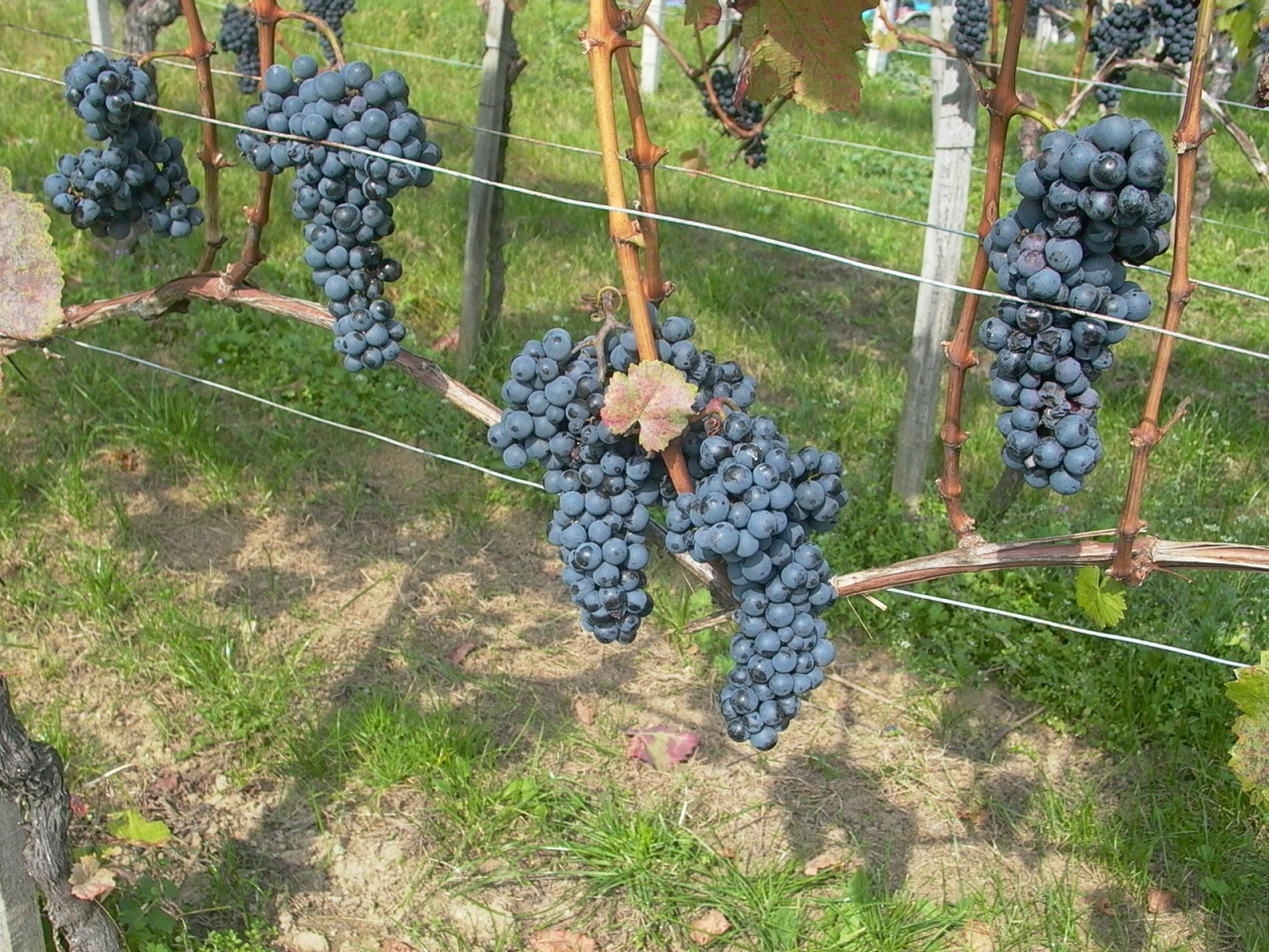 Lesereife Reben am Eisenberg, südliches Burgenland. Blaufränkisch ist die österreichische Bezeichnung der Rebe, in Deutschland wird sie Lemberger genannt. Author is Ulrich Prokop, 15.Oktober 2005 Other versions: Image:Blaufrankisch close up.JPG (crop)